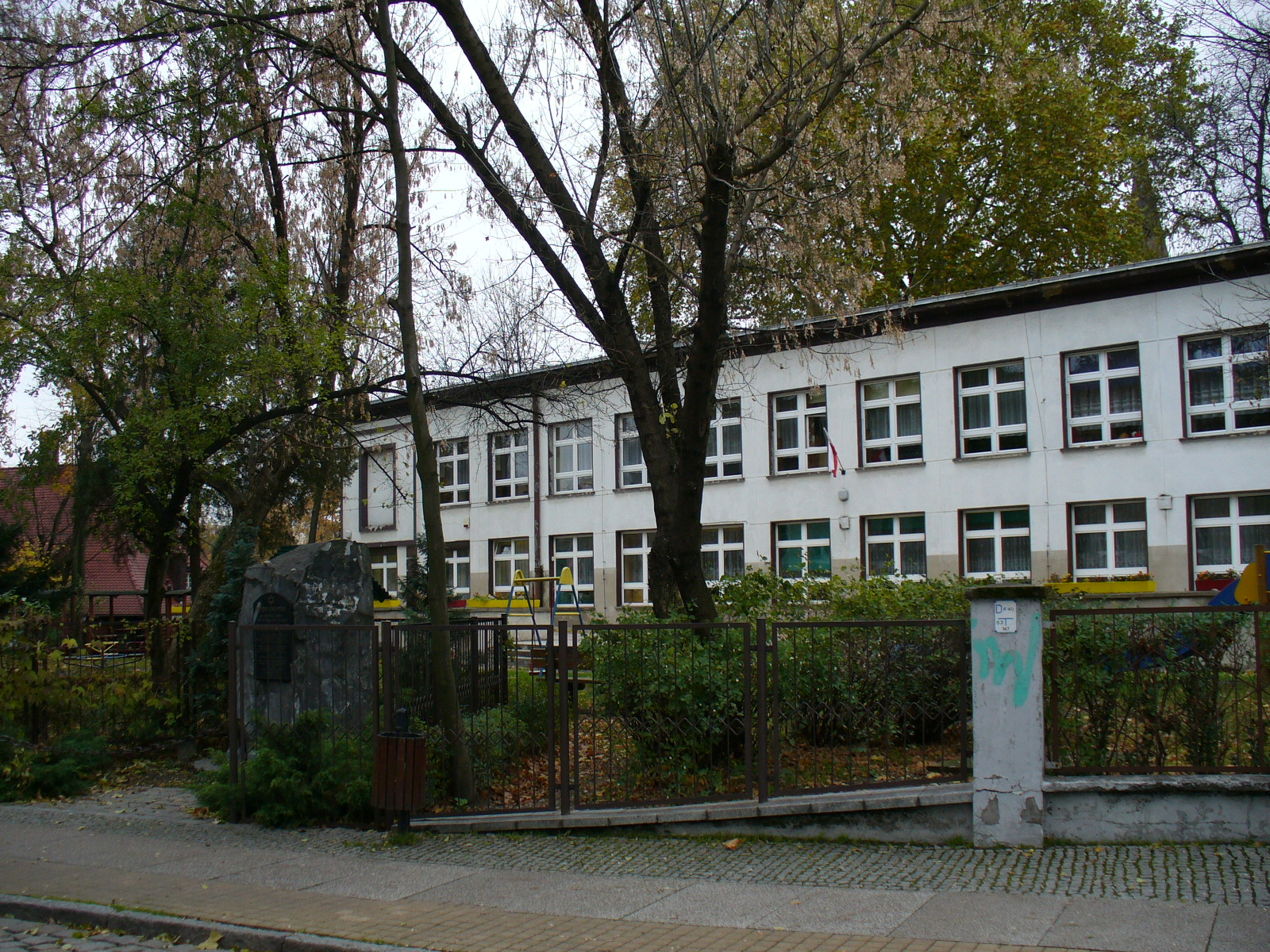 Opole - miejsce, w którym do 1938 r. stała Nowa Synagoga